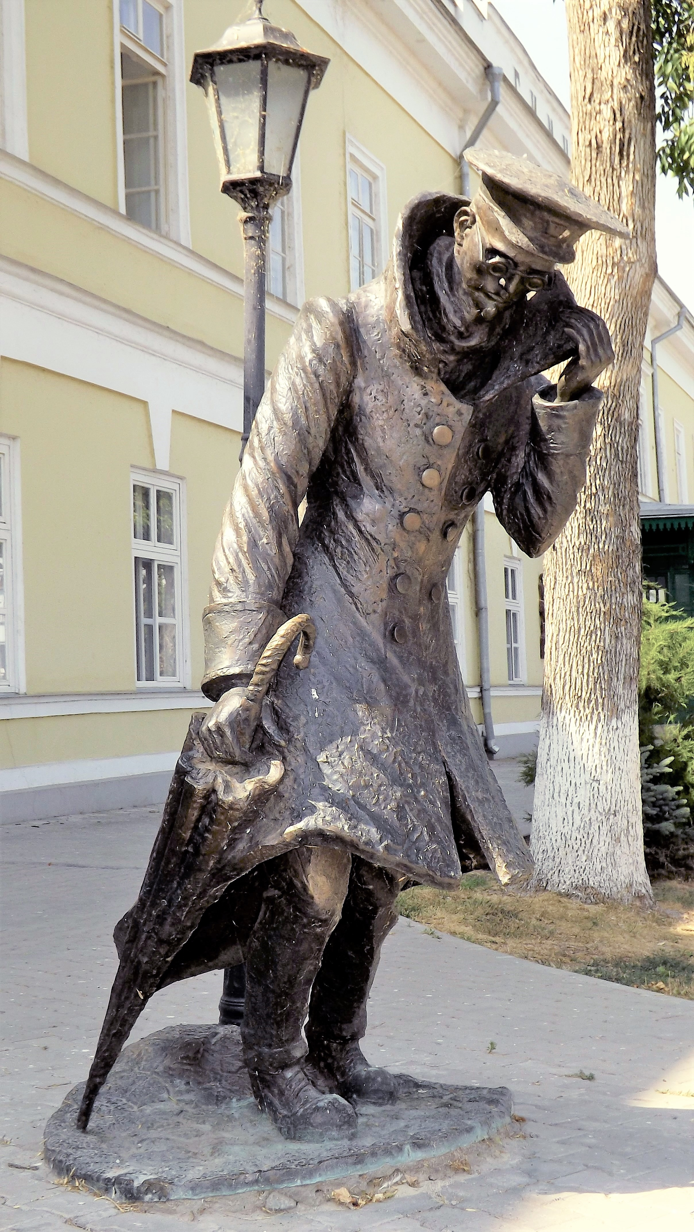 Таганрог.Памятник герою рассказа А.П.Чехова «Человек в футляре» (прототип - инспектор таганрогской гимназии А. Ф. Дьяконов).Памятник находится у переднего фасада гимназии им.А.П.Чехова.